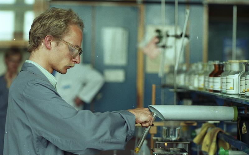 Juni 1988 Frankfurt am Main- Hoechst AG (Chemiewerk)- Auszubildende.